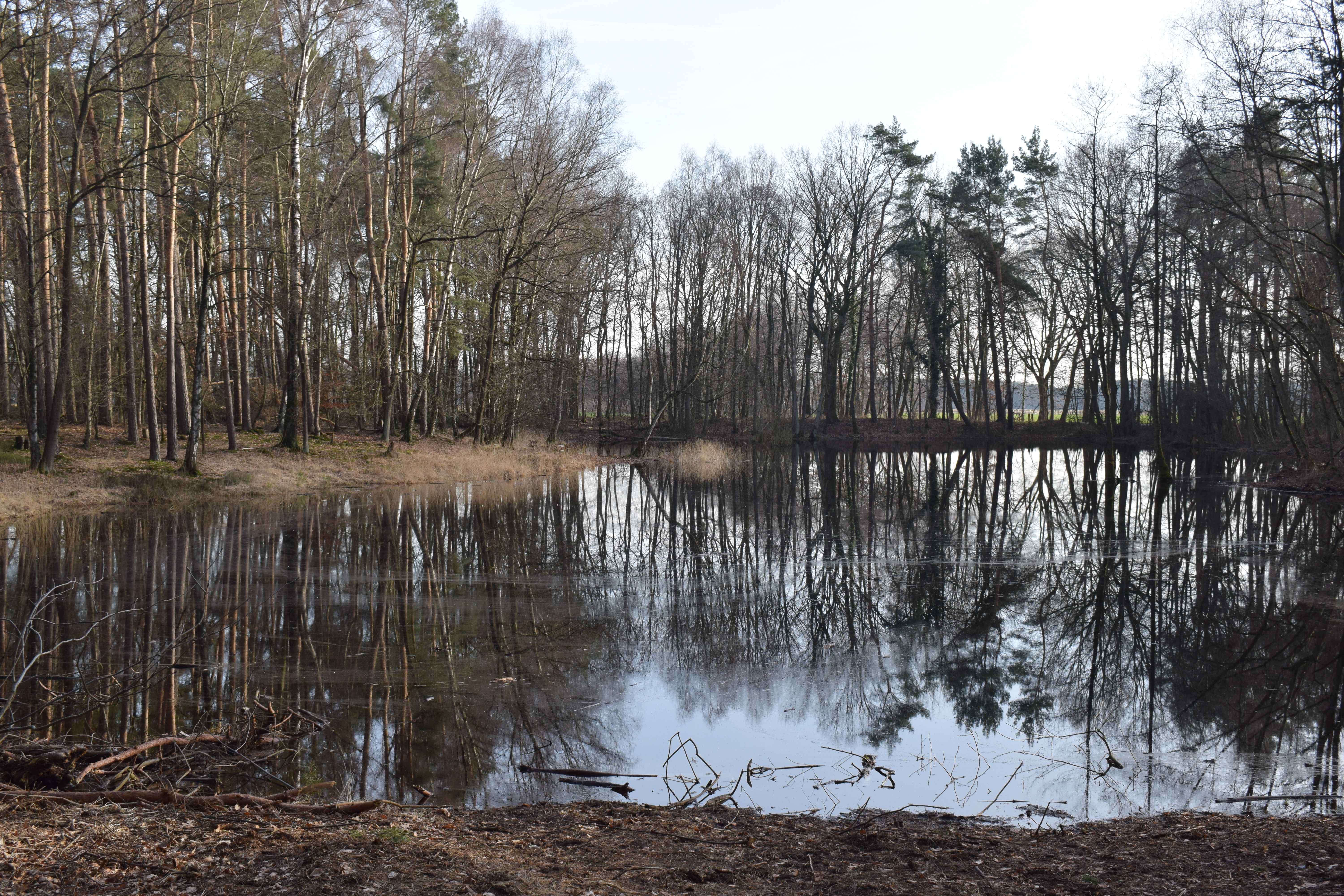 Heideweiher bei Paderborn-Sande